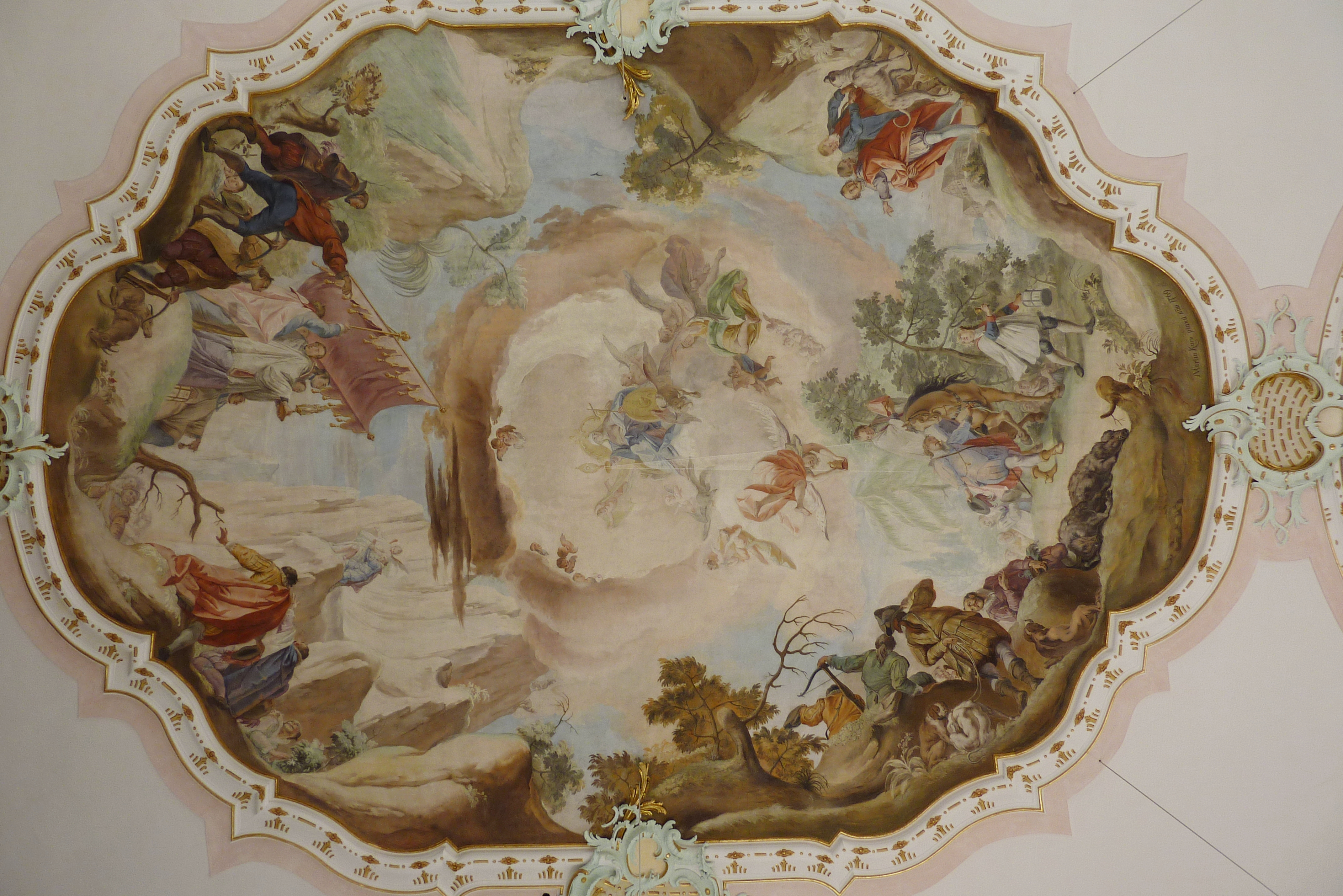 Katholische Pfarrkirche Mariä Himmelfahrt in Scheppach, einem Ortsteil von Jettingen-Scheppach im Landkreis Günzburg (Bayern), Stuck von 1769/70; Deckenfresko im Langhaus von Franz Martin Kuen, Darstellung: Personifikation der Kirche, Rettung von Kaiser Maximilian, Rudolf von Habsburg überlässt einem Priester sein Pferd; Signatur: Martin Kuen pinxit anno 1769